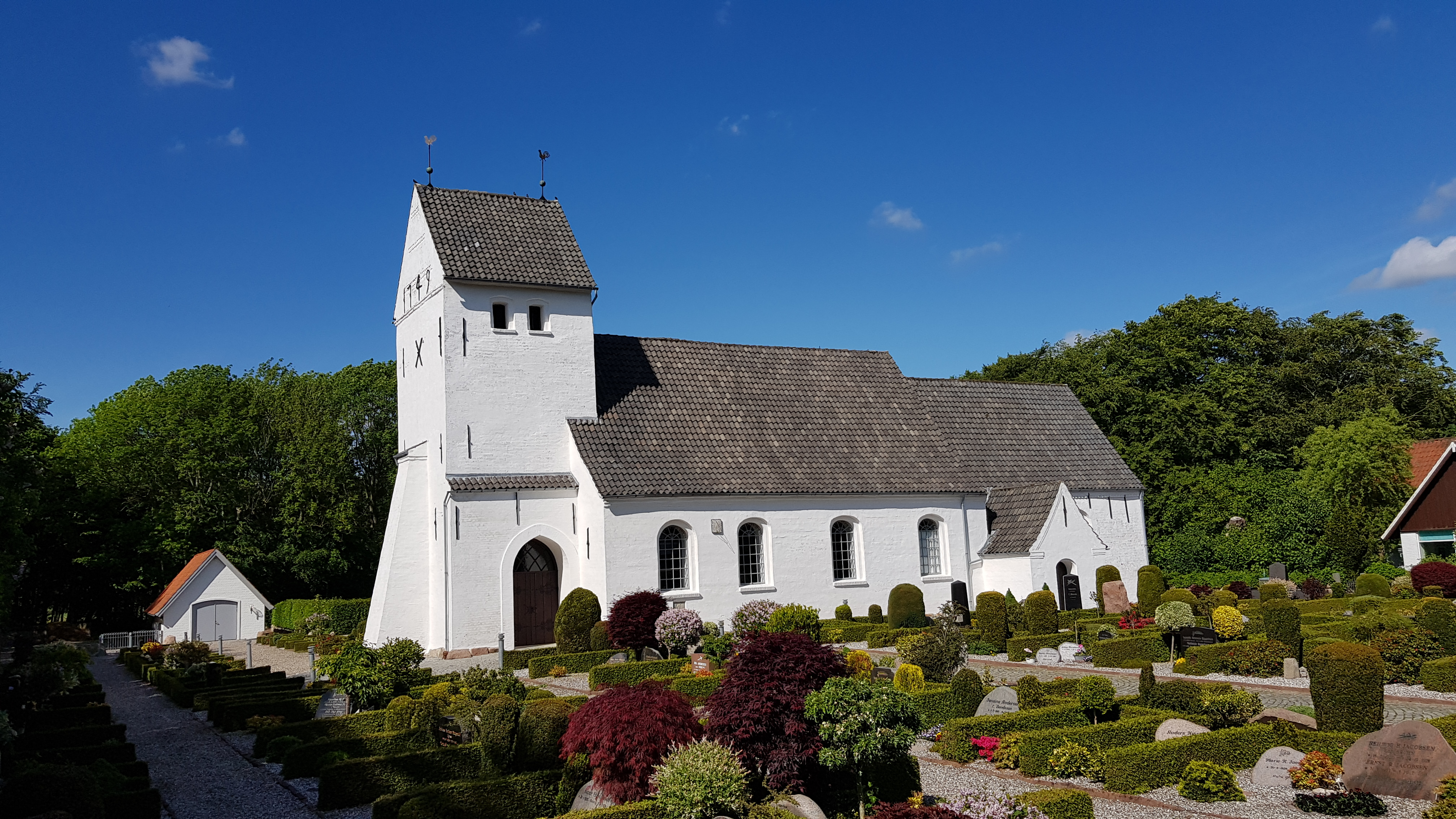 Abild Kirke